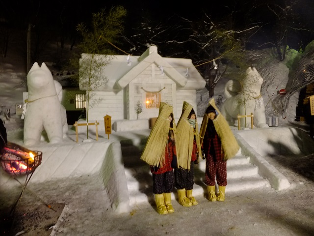 秋田県湯沢市の小正月行事・犬っこまつり（2015年） This photo has been taken in the country: Japan